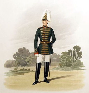 Камер-Паж Пажеского Его Императорского Величества корпуса. (В парадной форме.) 7 апреля 1857.